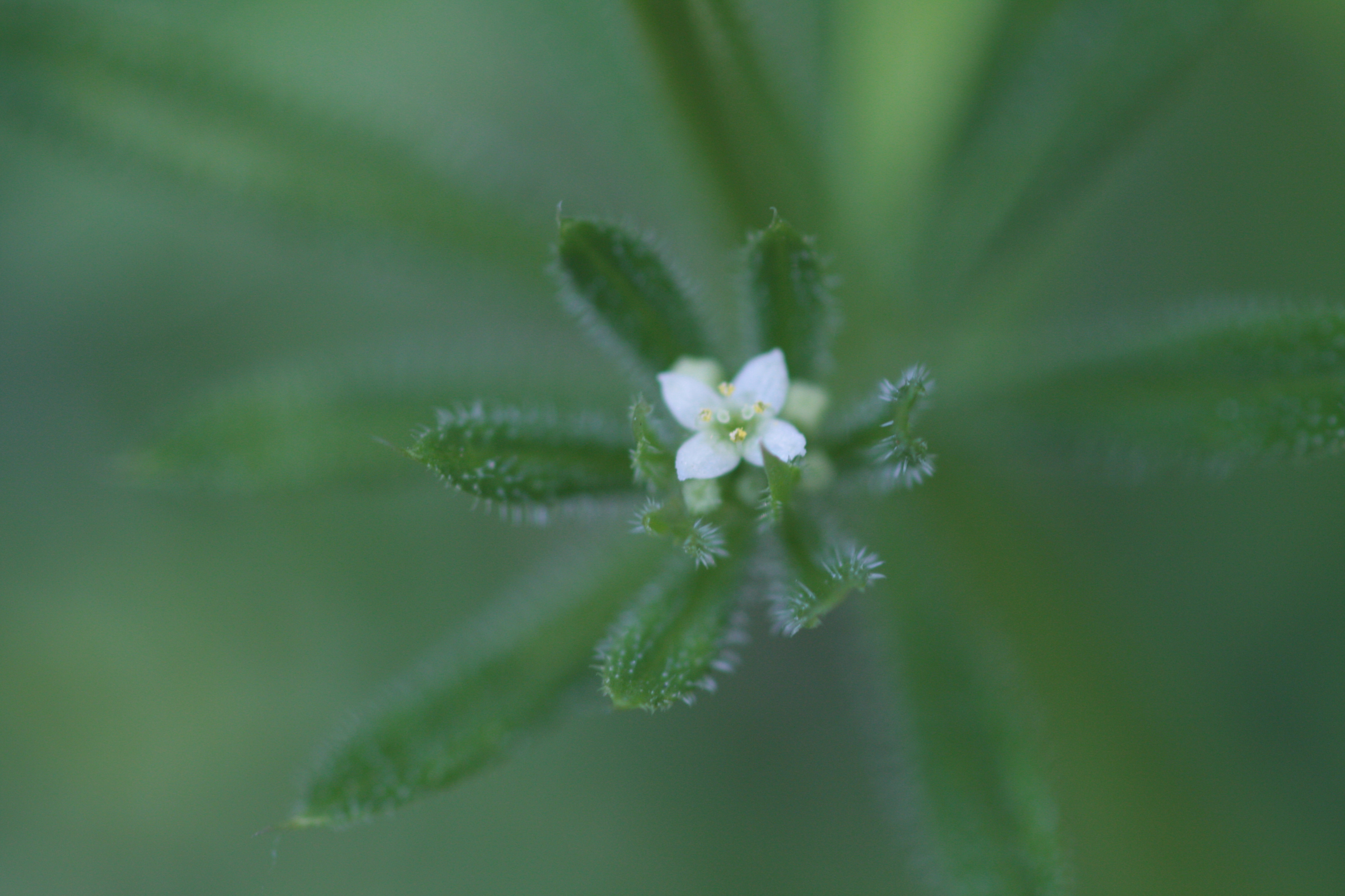 Galium spurium var. echinospermon